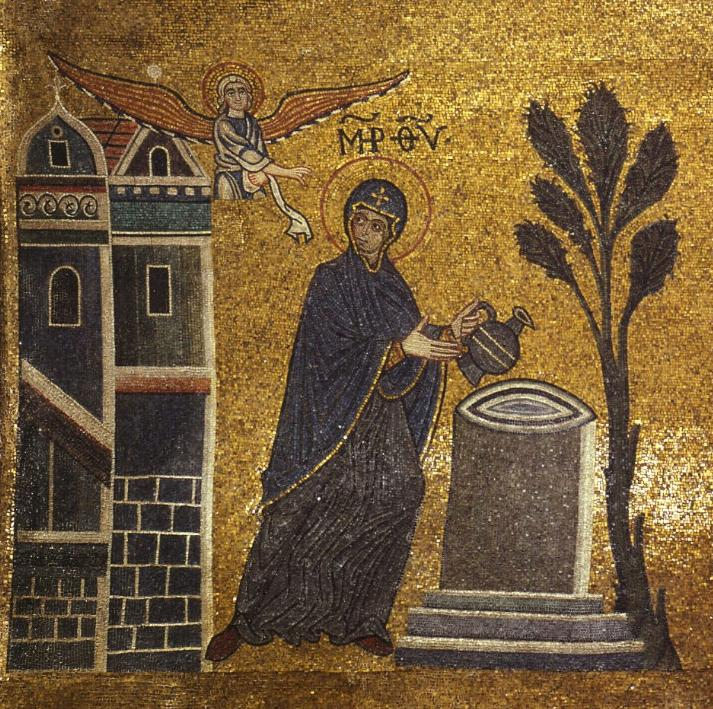 Благовещение. Мозаика, Собор св. Марка, Венеция, восстановлена в ХIV в. по эскизам ХI в.